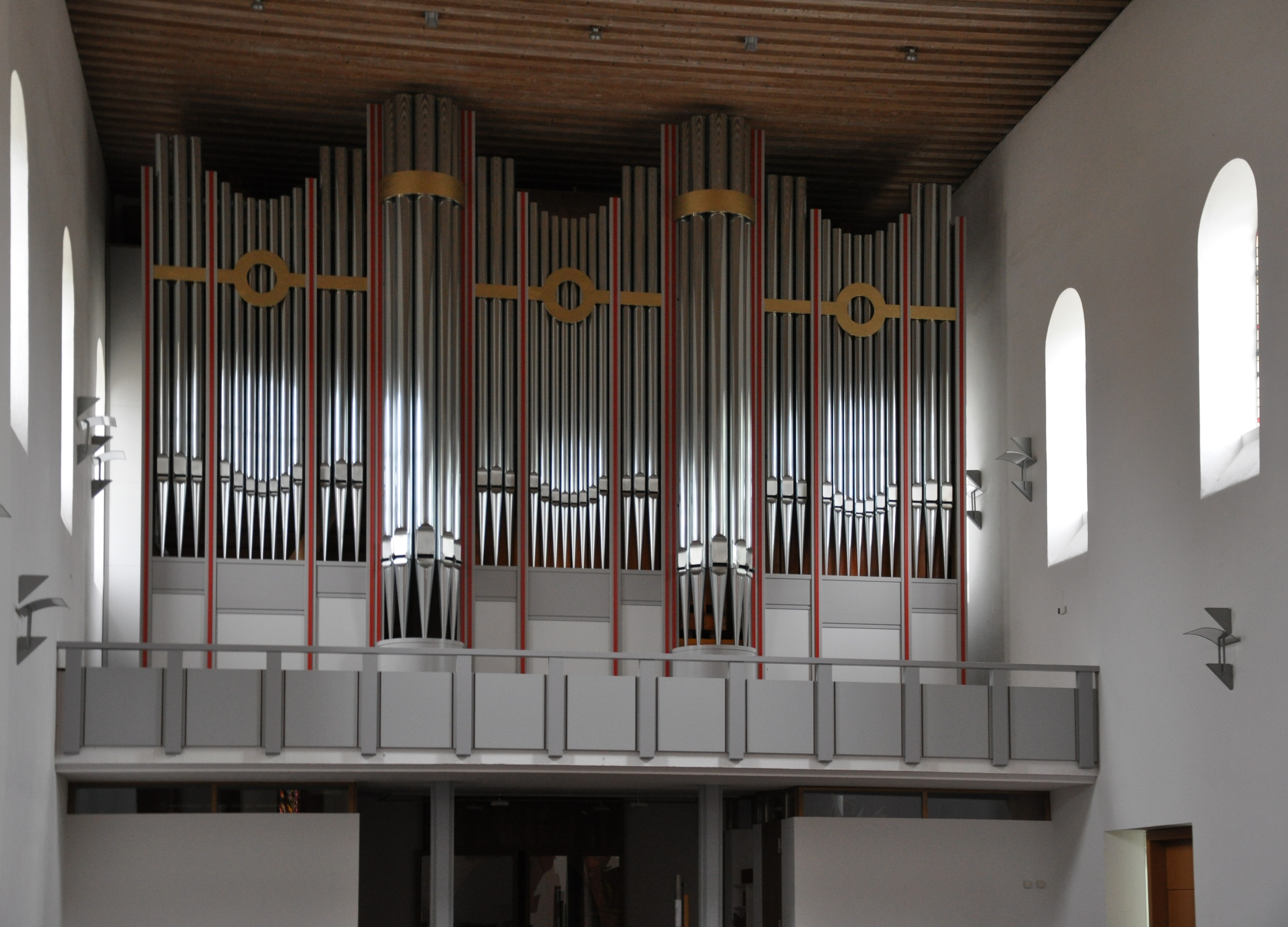 Ingelheim am Rhein, Saalkirche, Orgel von Ernest Martin Skinner (1930, ursprünglich in Passaic, New Jersey, USA) in neuem Prospekt der Fa. Johannes Klais, 2013